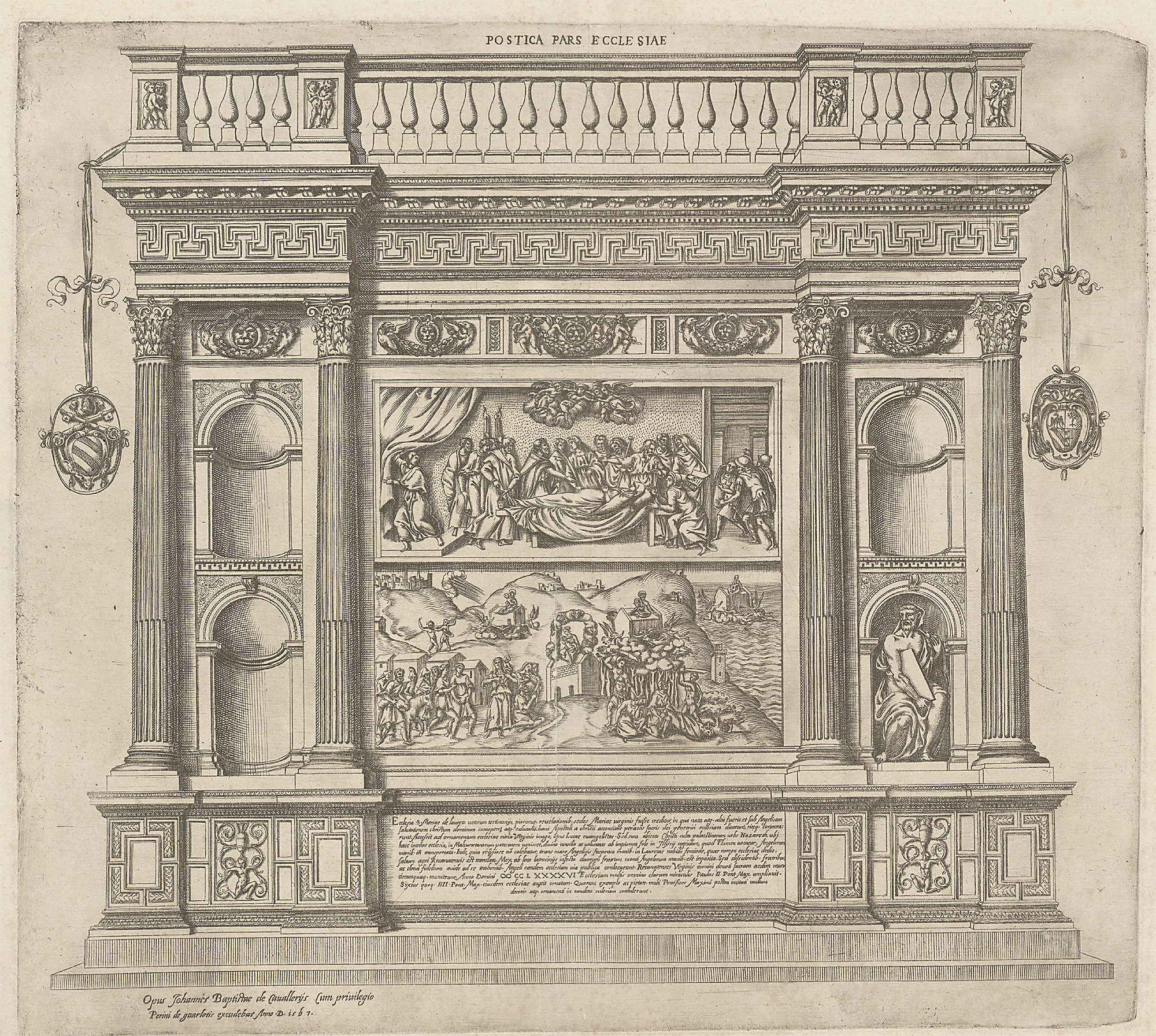 Cavalleriis, Joannes Baptista de: Postica pars ecclesiae (Lauretanae); Kupferstich, 1567